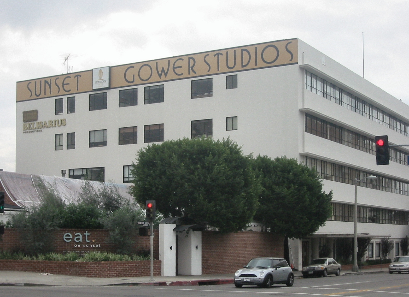 Sunset Gower Studios in Hollywood, CA